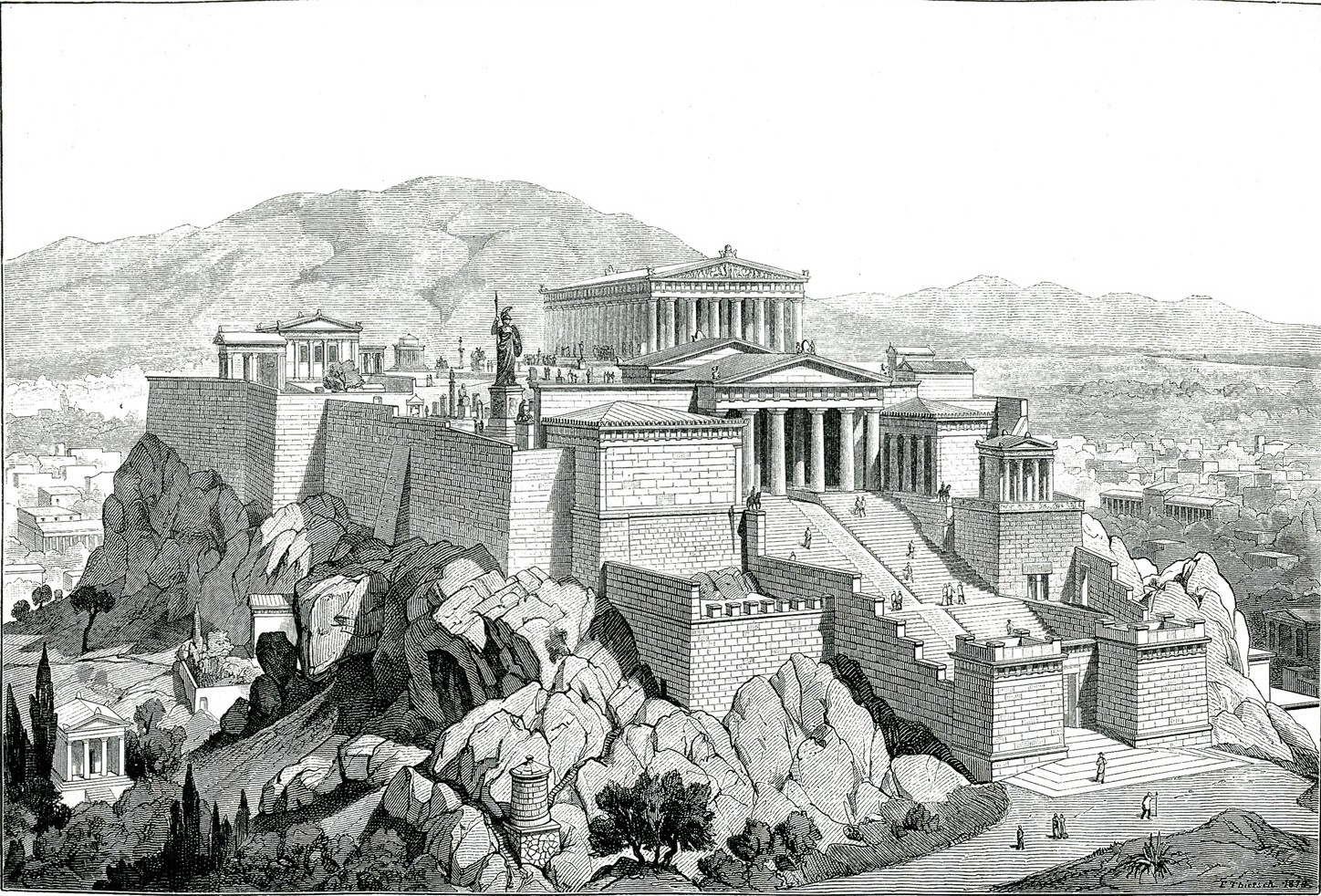 Ιάκωβος Φάλκε. Ελλάς, ο Βίος των Αρχαίων Ελλήνων. Κατά το γερμανικό του Ιακώβου Φάλκε, Ν. Γ. Πολίτης (μετ.), Αθήνα, Κάρολος Βίλμπεργκ, 1887